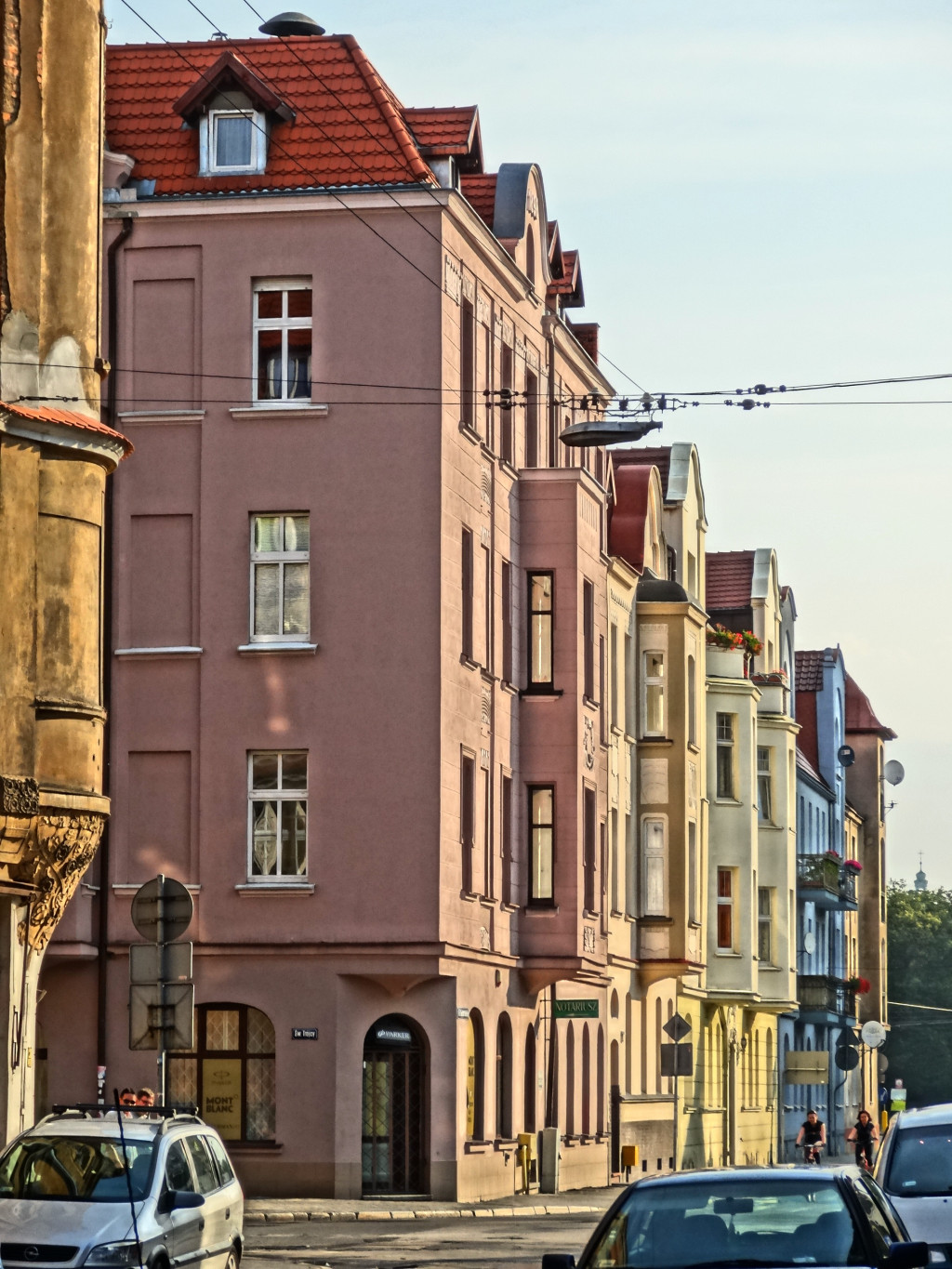 Ulica Augustyna Kordeckiego w Bydgoszczy